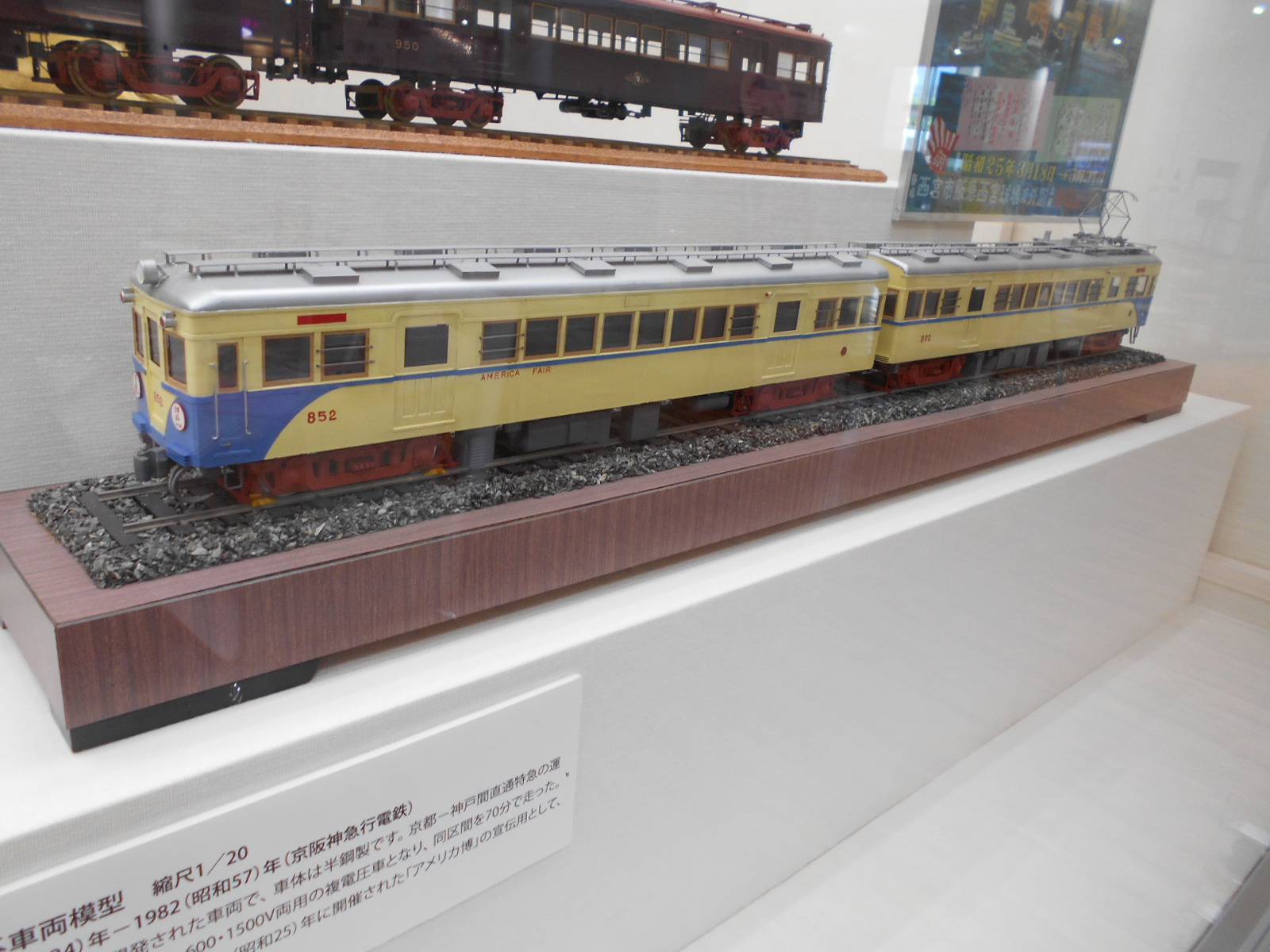 阪急西宮ガーデンズにて撮影